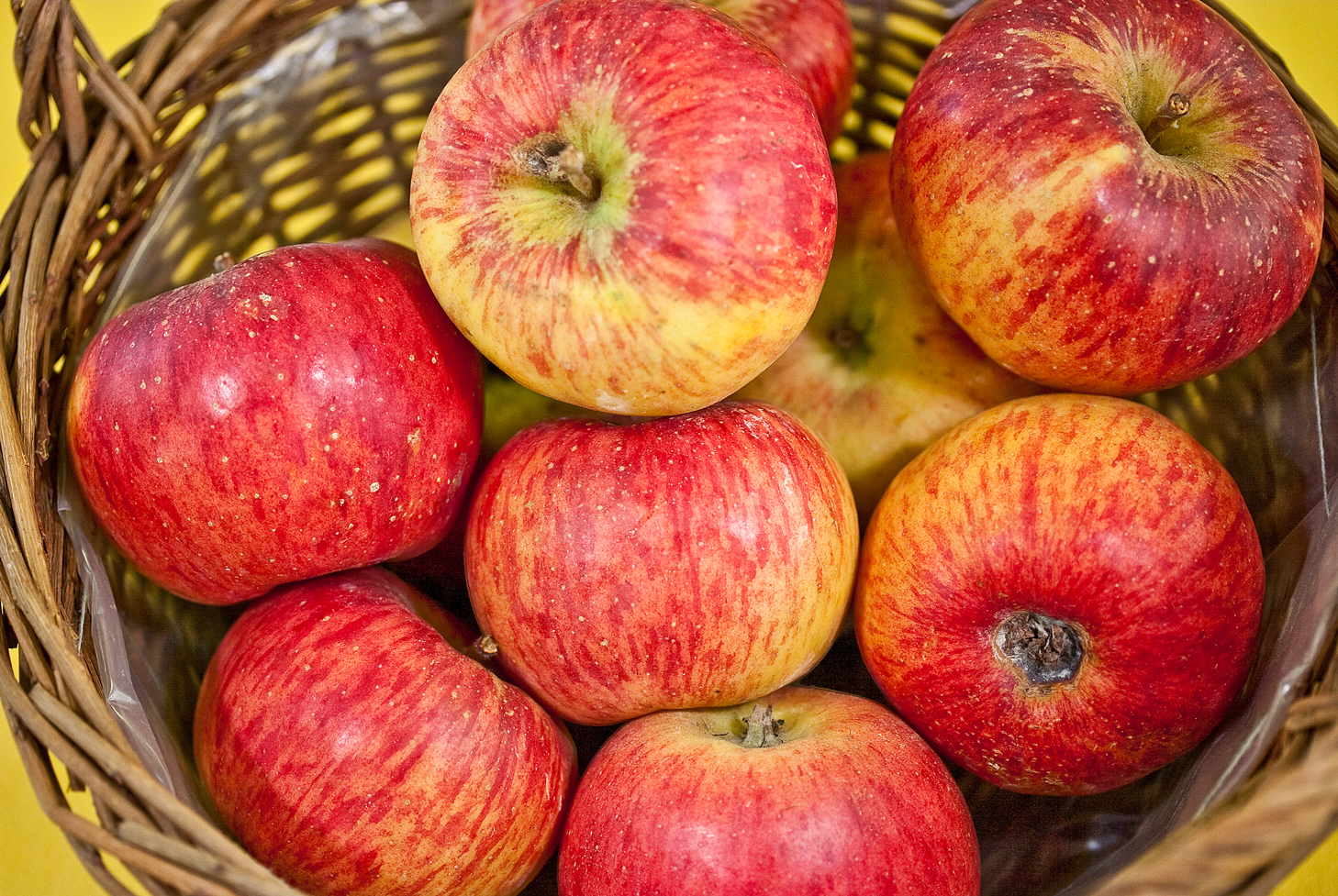 Der Topaz ist eine Apfelsorte